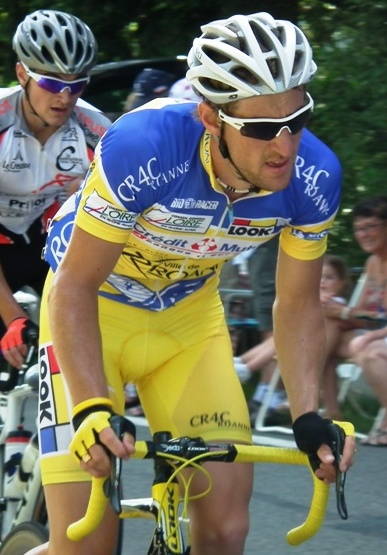 Grand Prix Cours la Ville